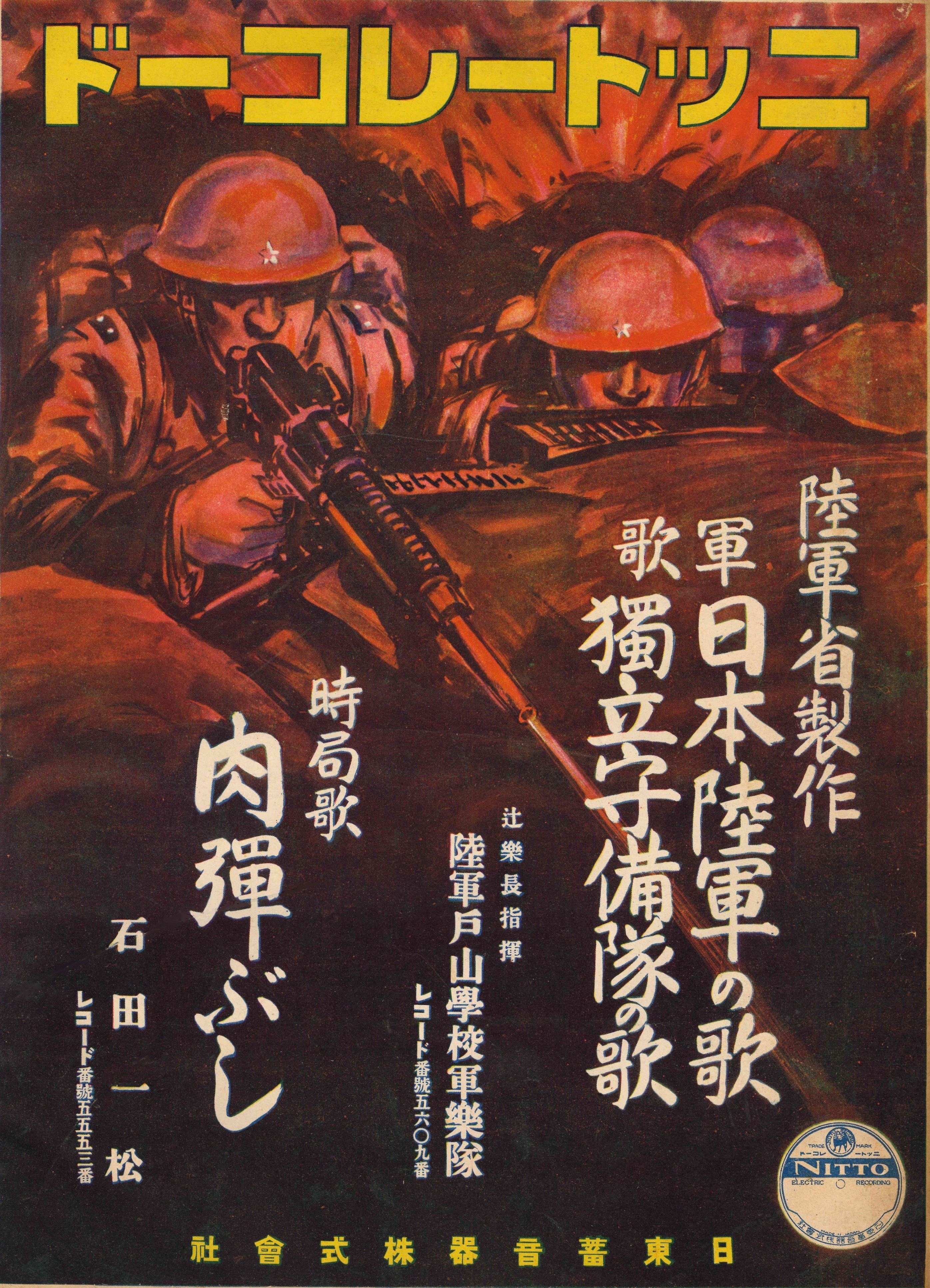 サンデー毎日（昭和7年3月27日発行）の裏表紙に掲載された日東蓄音器の軍歌レコードの広告。 / ニットーレコード / 陸軍省製作 / 軍歌 / 日本陸軍の歌 / 獨立守備隊の歌 （独立守備隊の歌） / 辻楽長指揮 / 陸軍戸山學校軍樂隊 （陸軍戸山学校軍楽隊） / レコード番号五六〇九番 / 時局歌 / 肉彈ぶし（肉弾ぶし） / 石田一松 / レコード番号五五五三番 / 日東蓄音器株式會社（日東蓄音器株式会社）